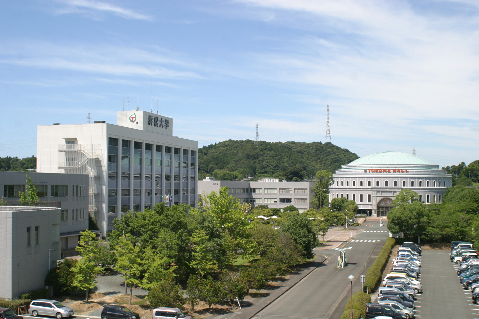 ■浜松大学校舎 （左から、本館、3号館、トコハホール）